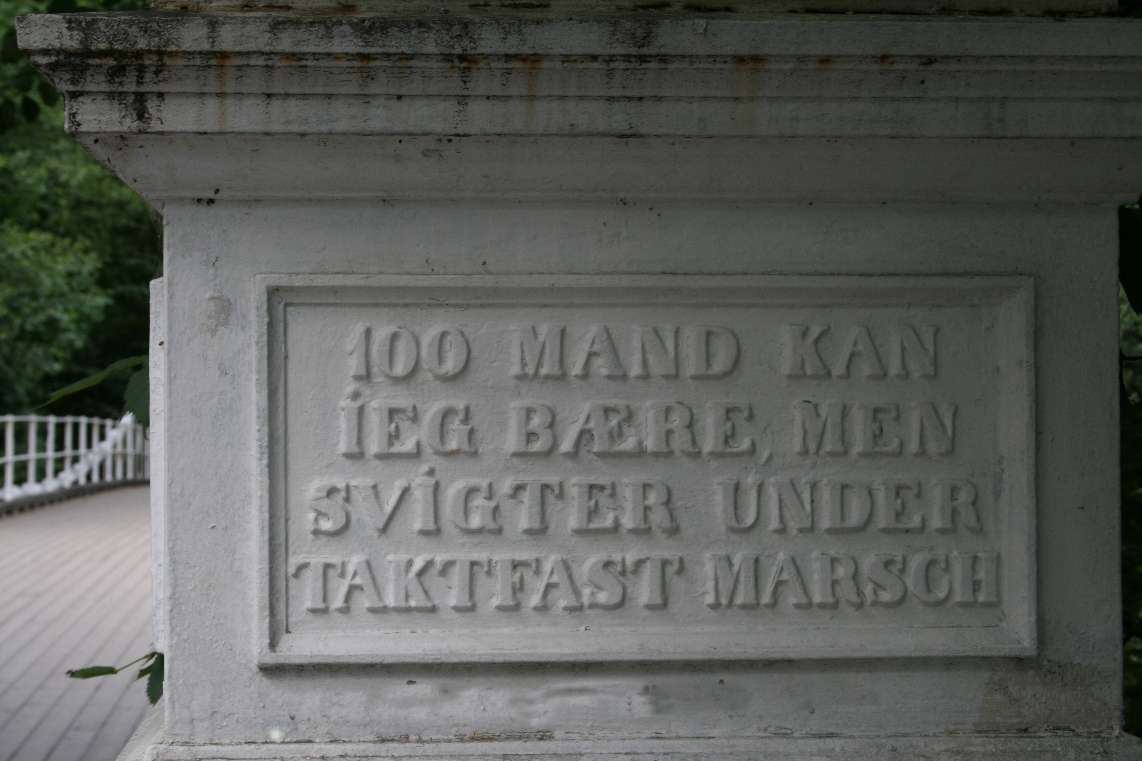 Detalj fra Aamodt bru (Akerselva, Oslo)